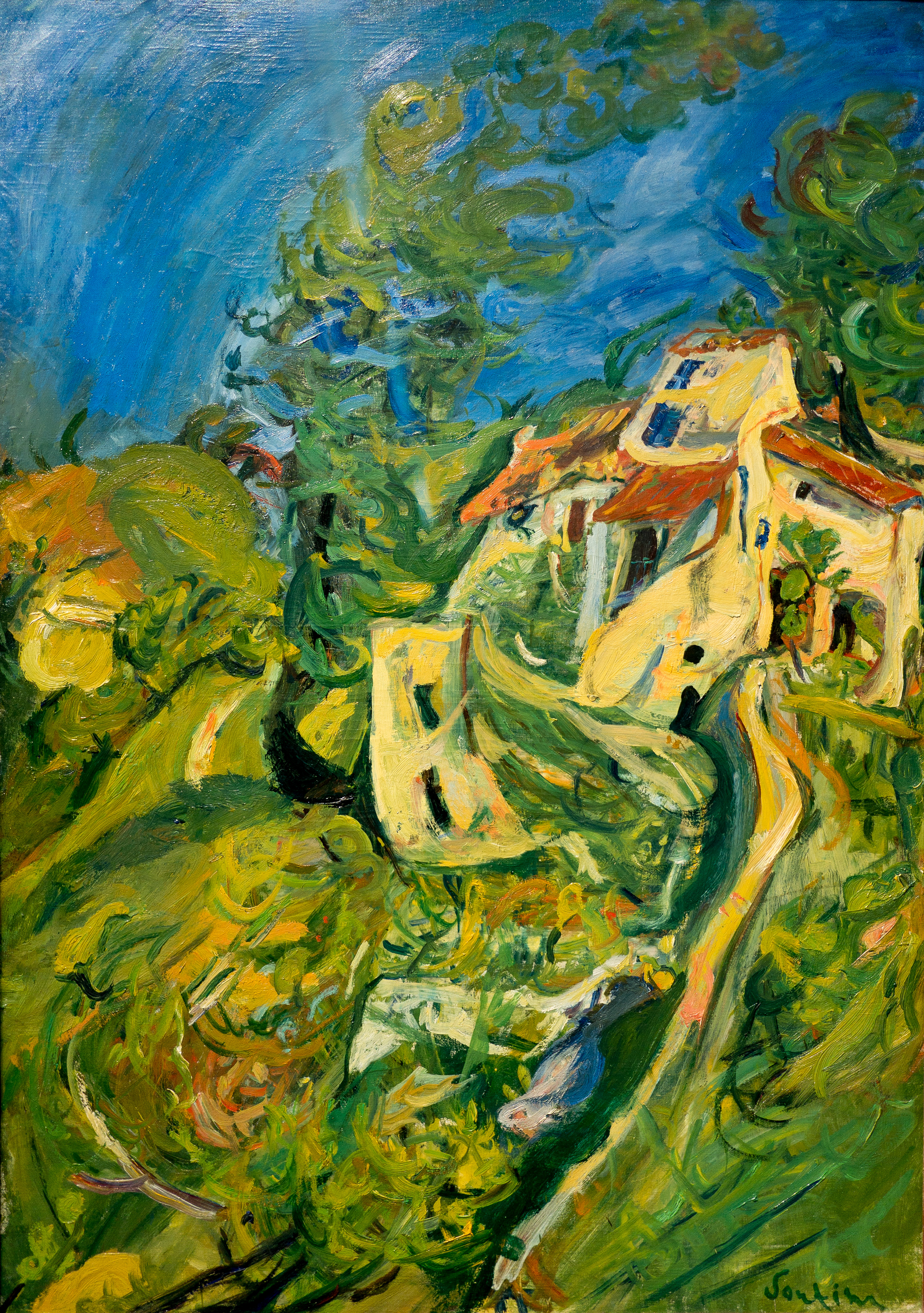 Chaïm Soutine (1893 - 1943), "Paysage", huile sur toile, vers 1922-1923, Coll. Jean Walter et Paul Guillaume, Musée de l'Orangerie, Paris